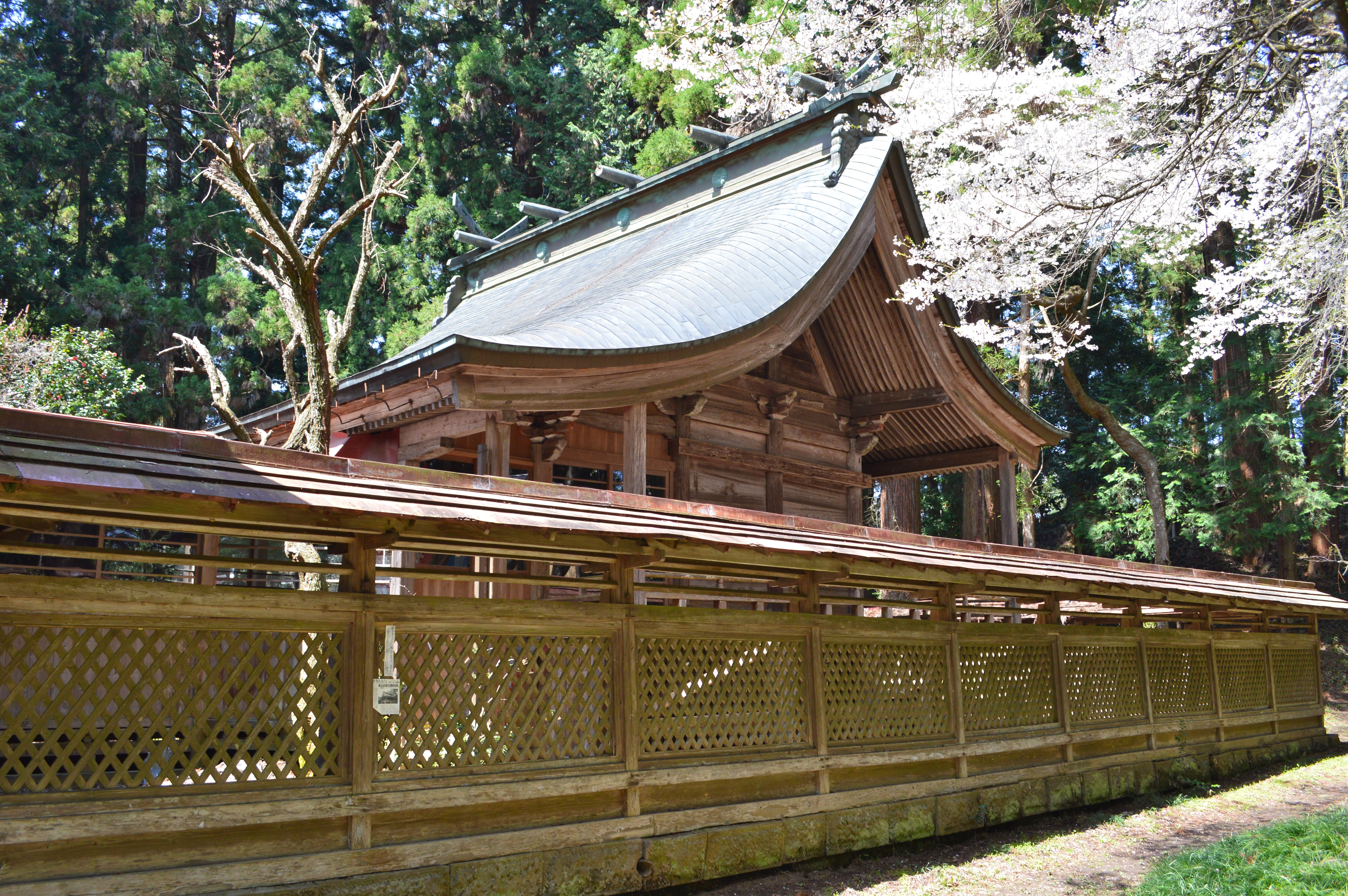 都都古和氣神社 (棚倉町棚倉) 本殿